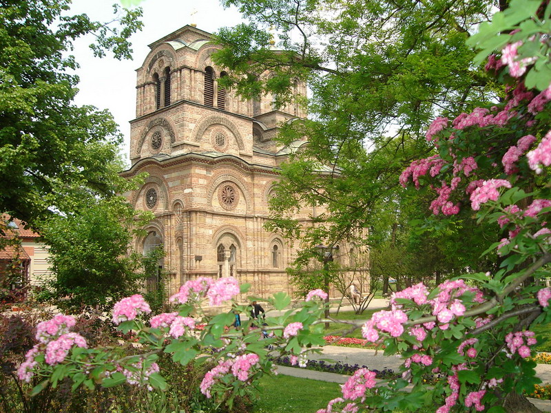 Crkva Lazarica